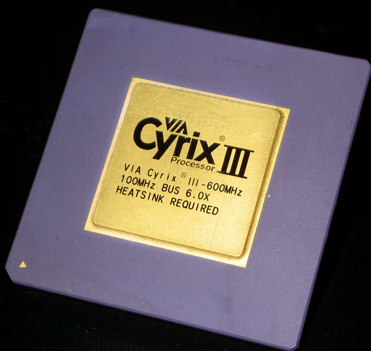 "VIA CyrixIII Processer 600MHz (C5A/Samuel)"